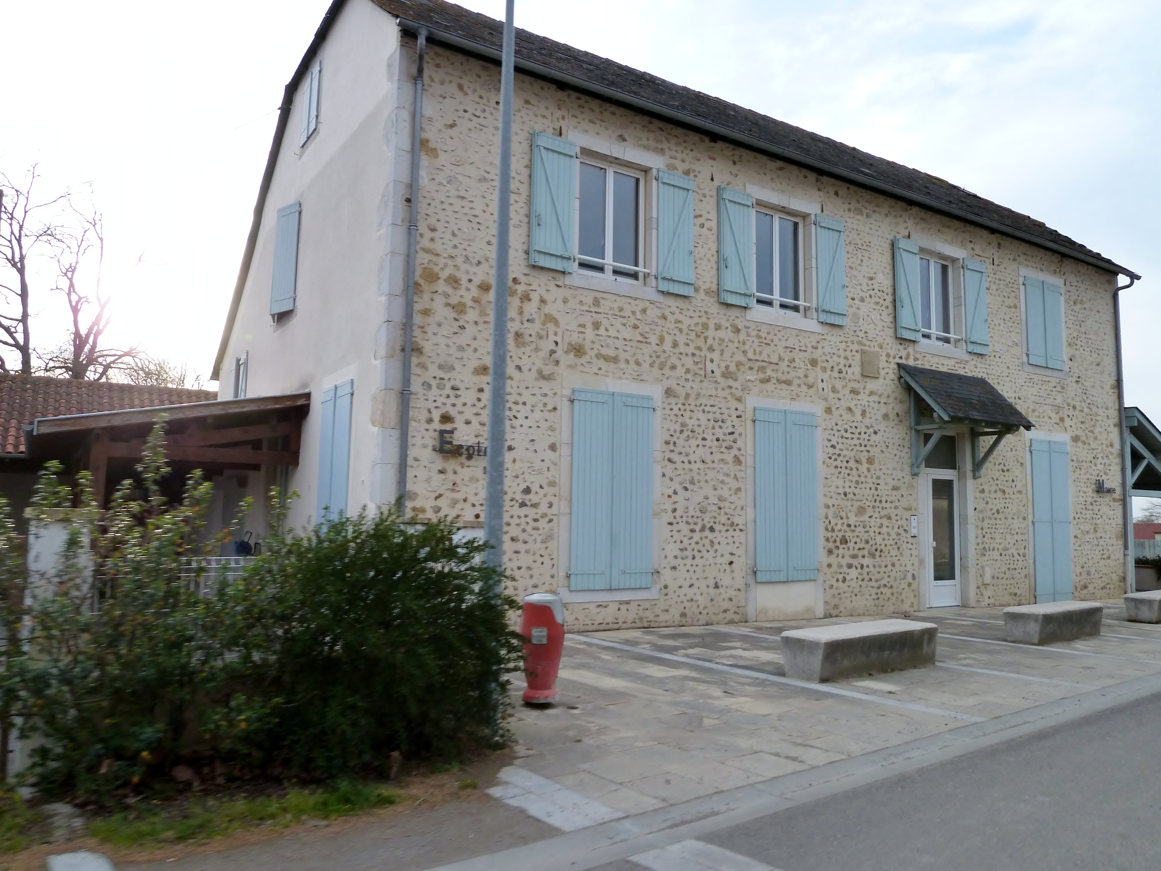 École de Boueilh-Boueilho-Lasque